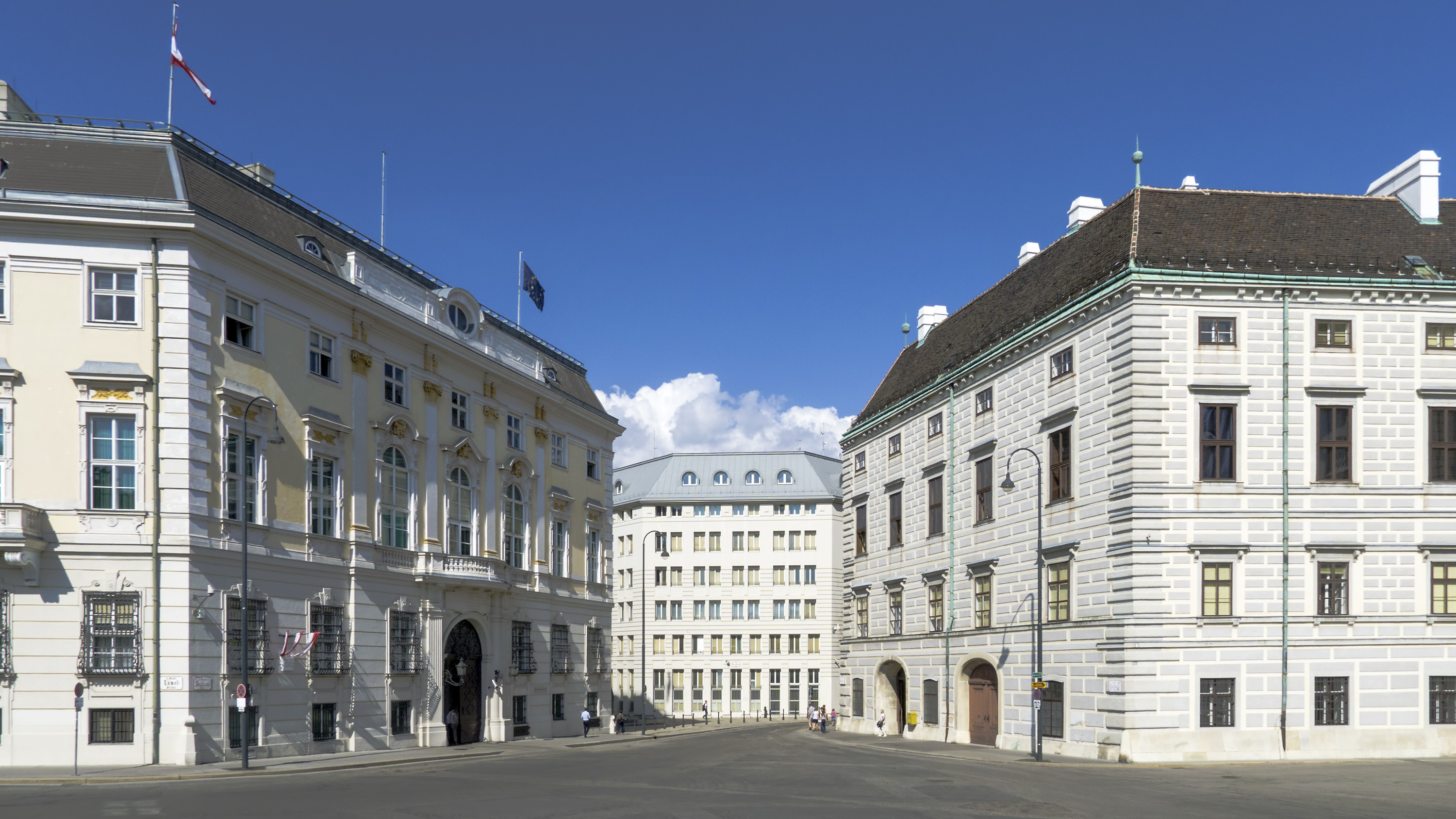 Ballhausplatz in Wien 1 beim Volksgarten Richtung Nordosten